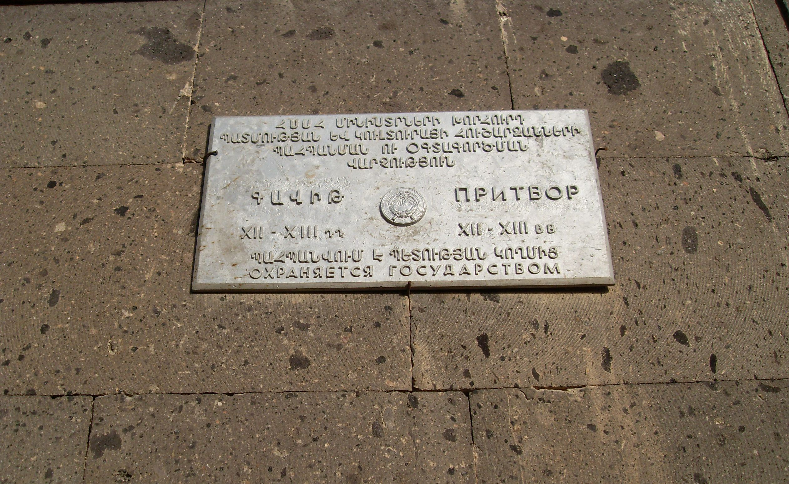 Եղիպատրուշի X-XIII դարերի եկեղեցու գավթի ցուցանակը 40/3